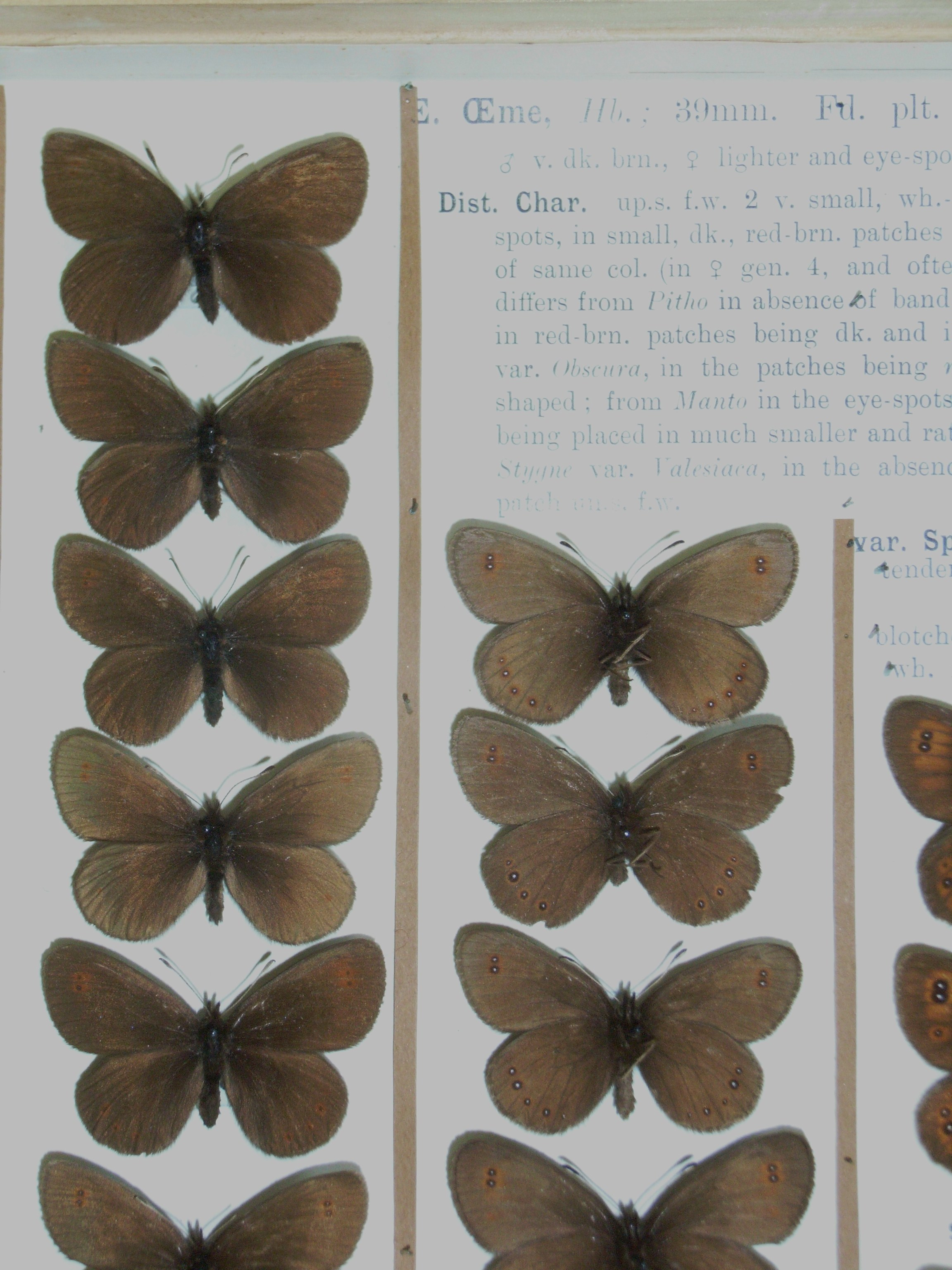 Erebia oeme